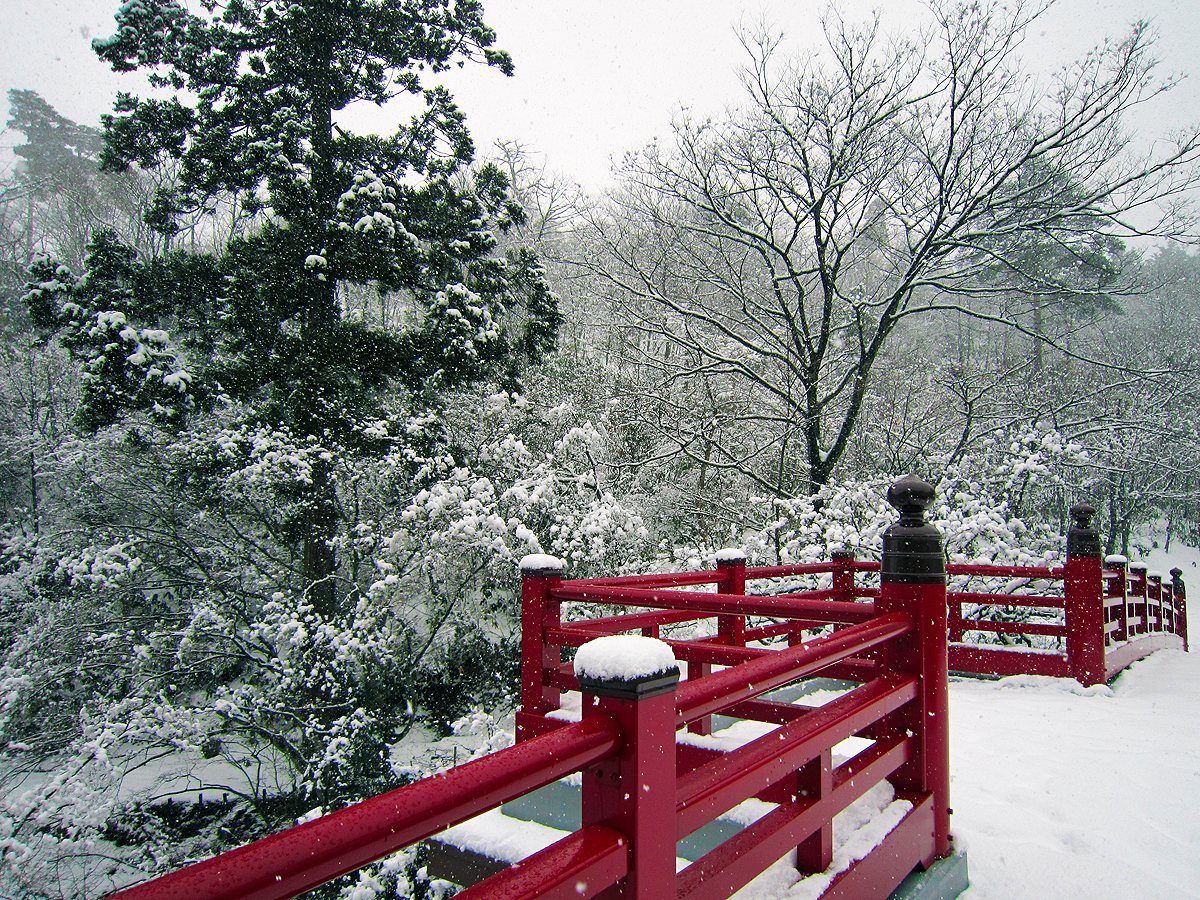 雪舞う弥彦公園 (Snowy Yahiko Park) 07 Jan, 2012